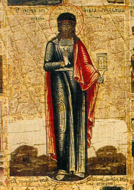 Св. Фекла с житием (средник). Икона. Россия. Конец XVIII в. 35.9 х 30.8. Частное собрание.